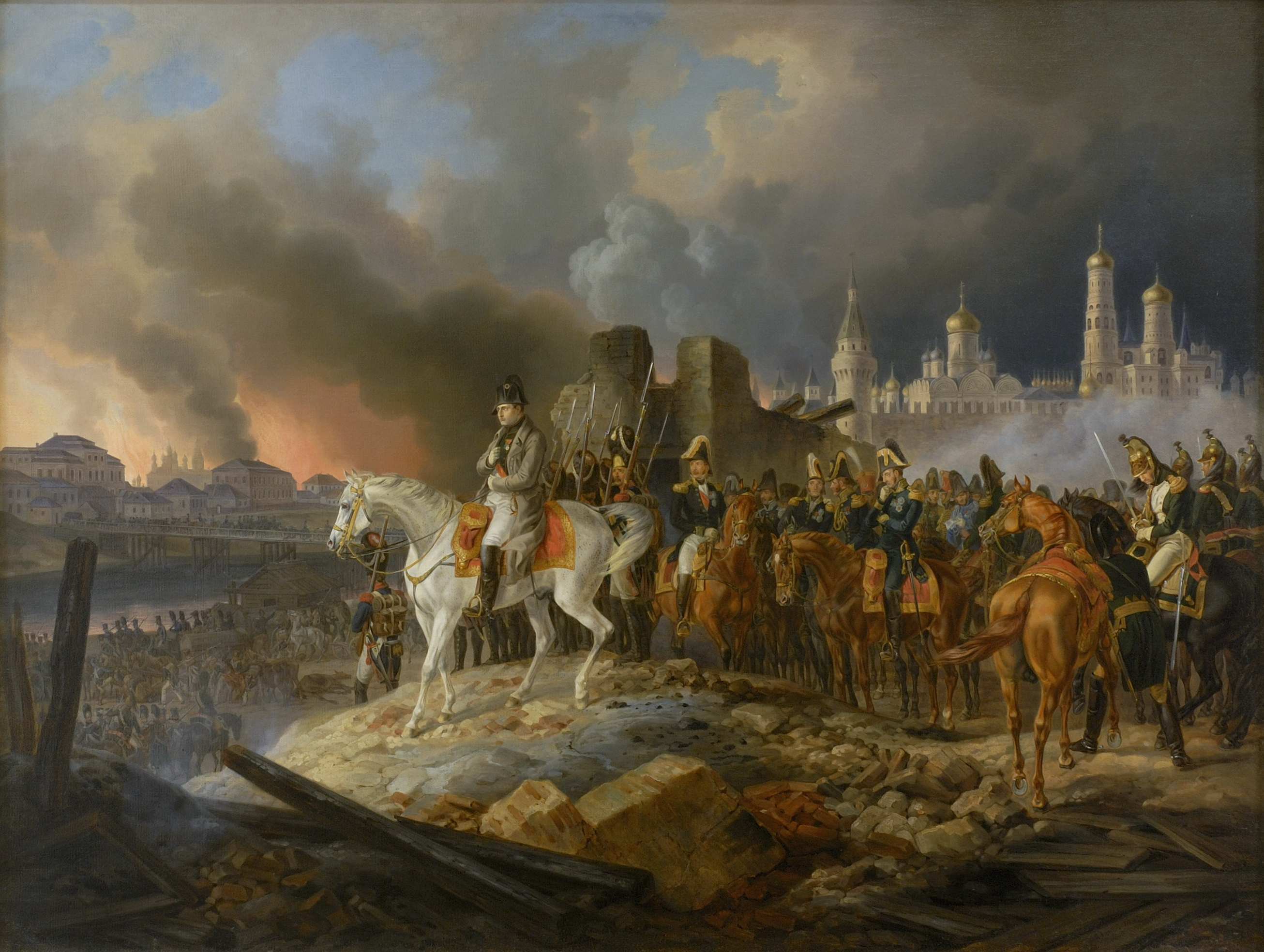 Альбрехт Адам (Германия). Наполеон в горящей Москве, 1841